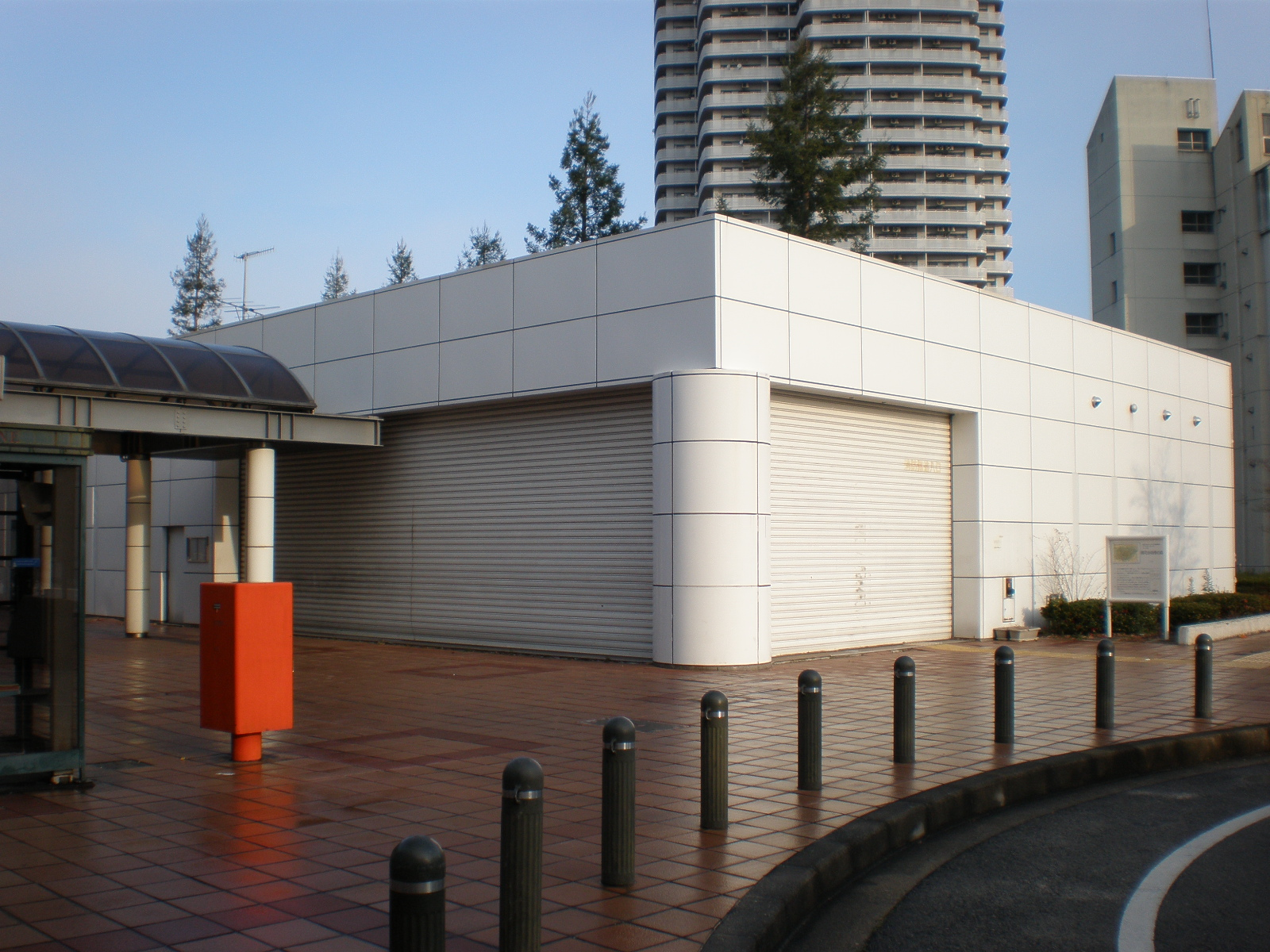 愛知県小牧市にある桃花台センター駅（廃止後）